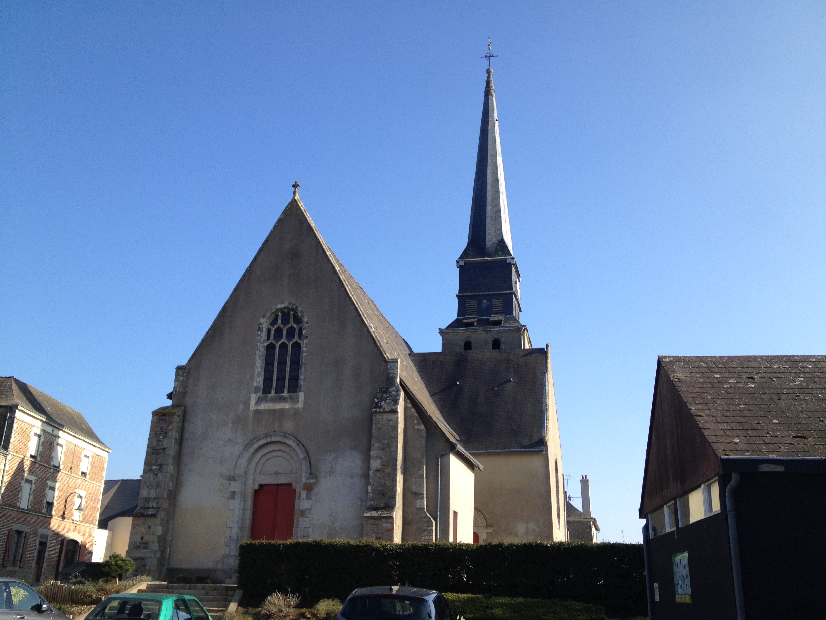 Cuillé (Mayenne, France) - l'église.